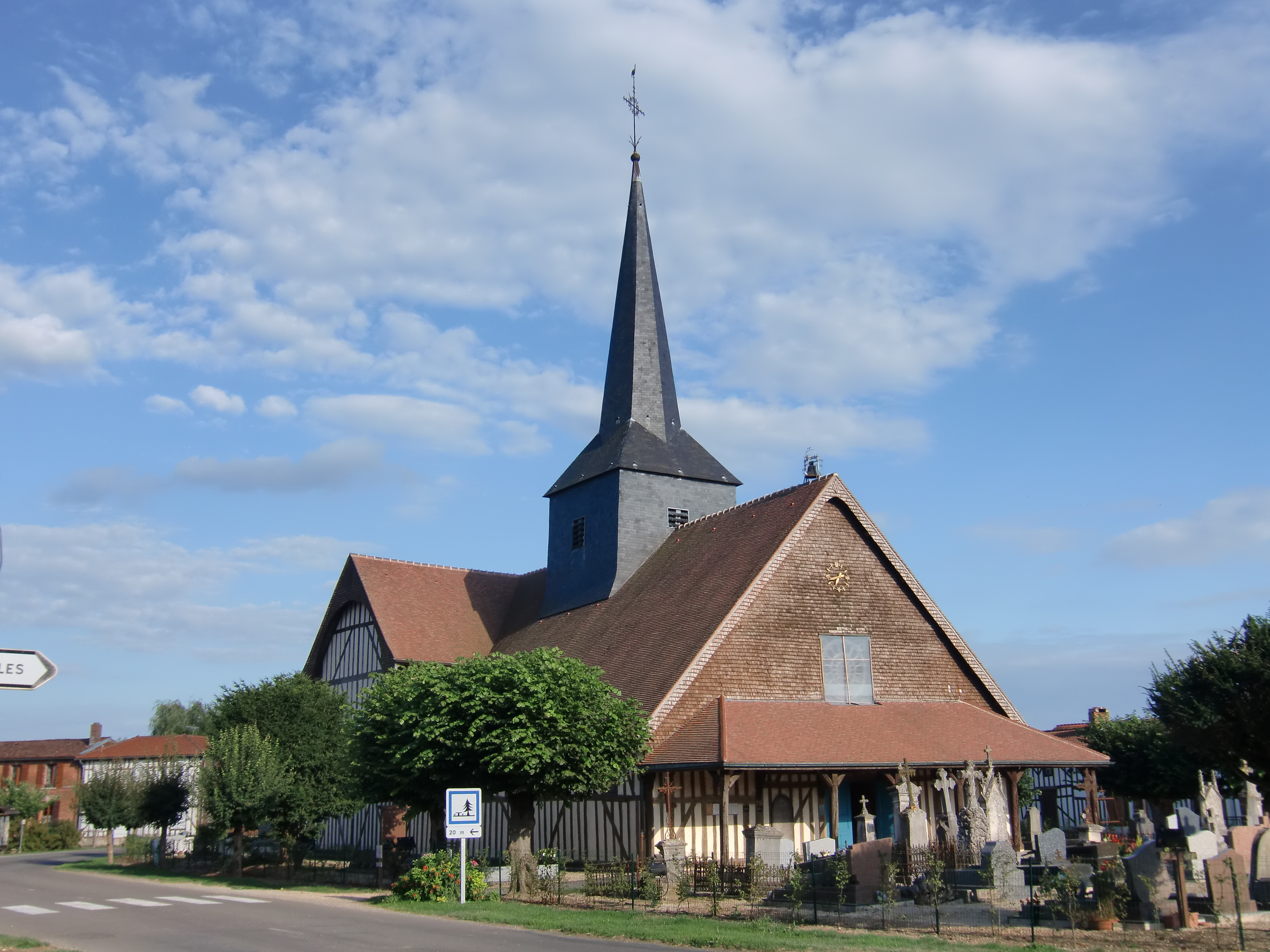 Eglise d'Outines (Marne - Champagne - France) édifice à pans de bois de la région du Der